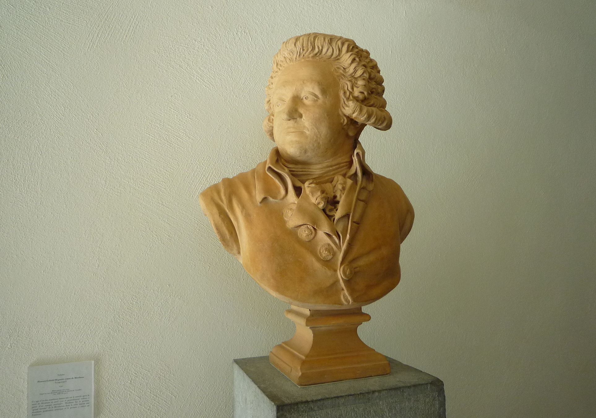 Buste d'Honoré-Gabriel Riquetti, comte de Mirabeau (1749-1791), Musée de la Révolution française (Vizille).